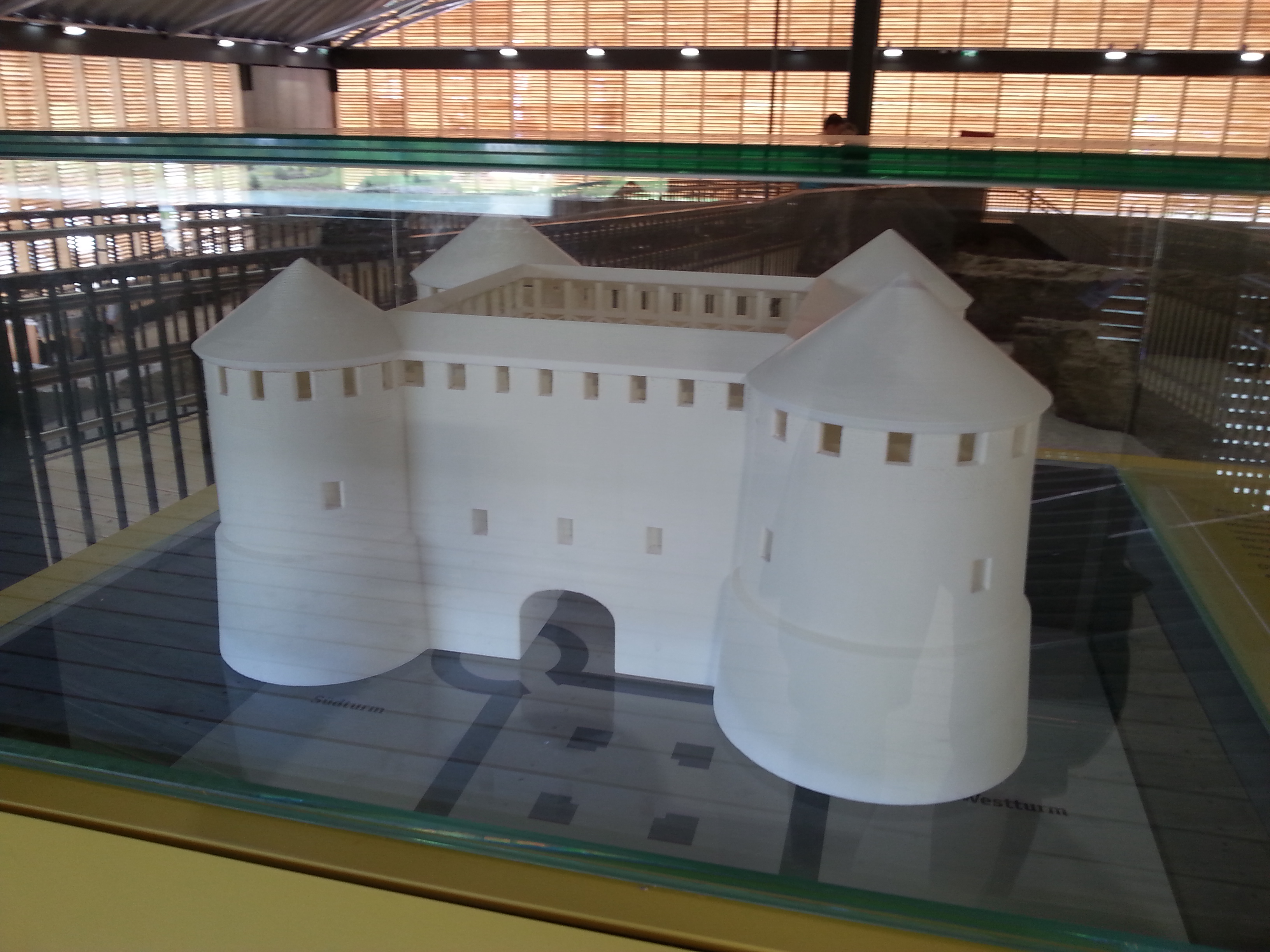 Burgus Oberranna (A), Rekonstruktionsmodell, Ansicht von Norden.